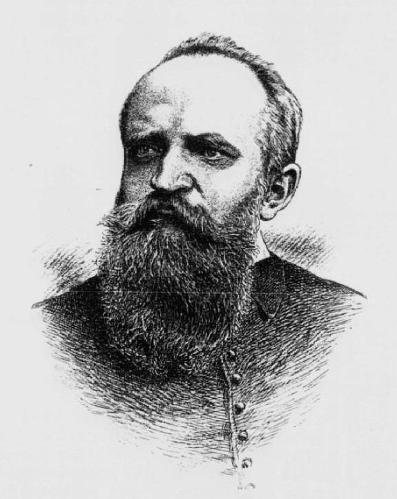 Karel Adámek (1843-1914), rakouský a český právník a politik